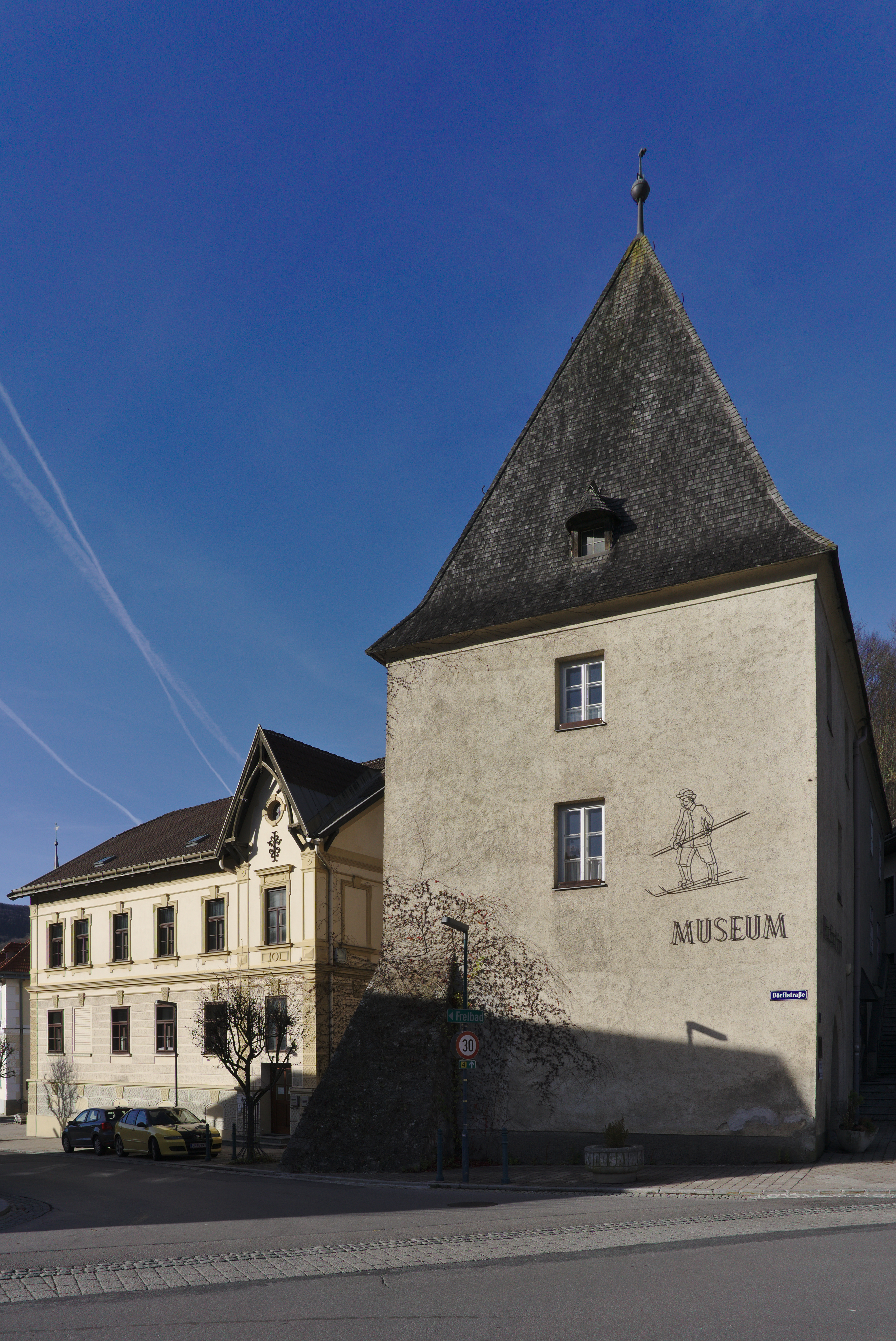 Heimatmuseum, Dienerturm Arbeitsamt